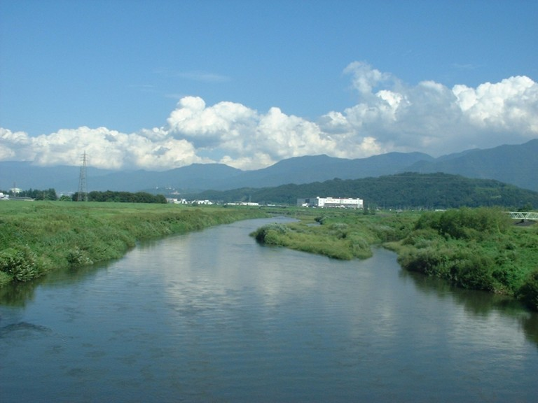 笛吹川 山梨県ja:中巨摩郡ja:玉穂町／東八代郡豊富村（いづれも撮影当時。現・中央市）豊積橋から上流方を望む。